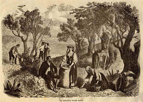 Raccolta delle oliva : stampa dal Il Giornale Illustrato 1864, Torino - Italia